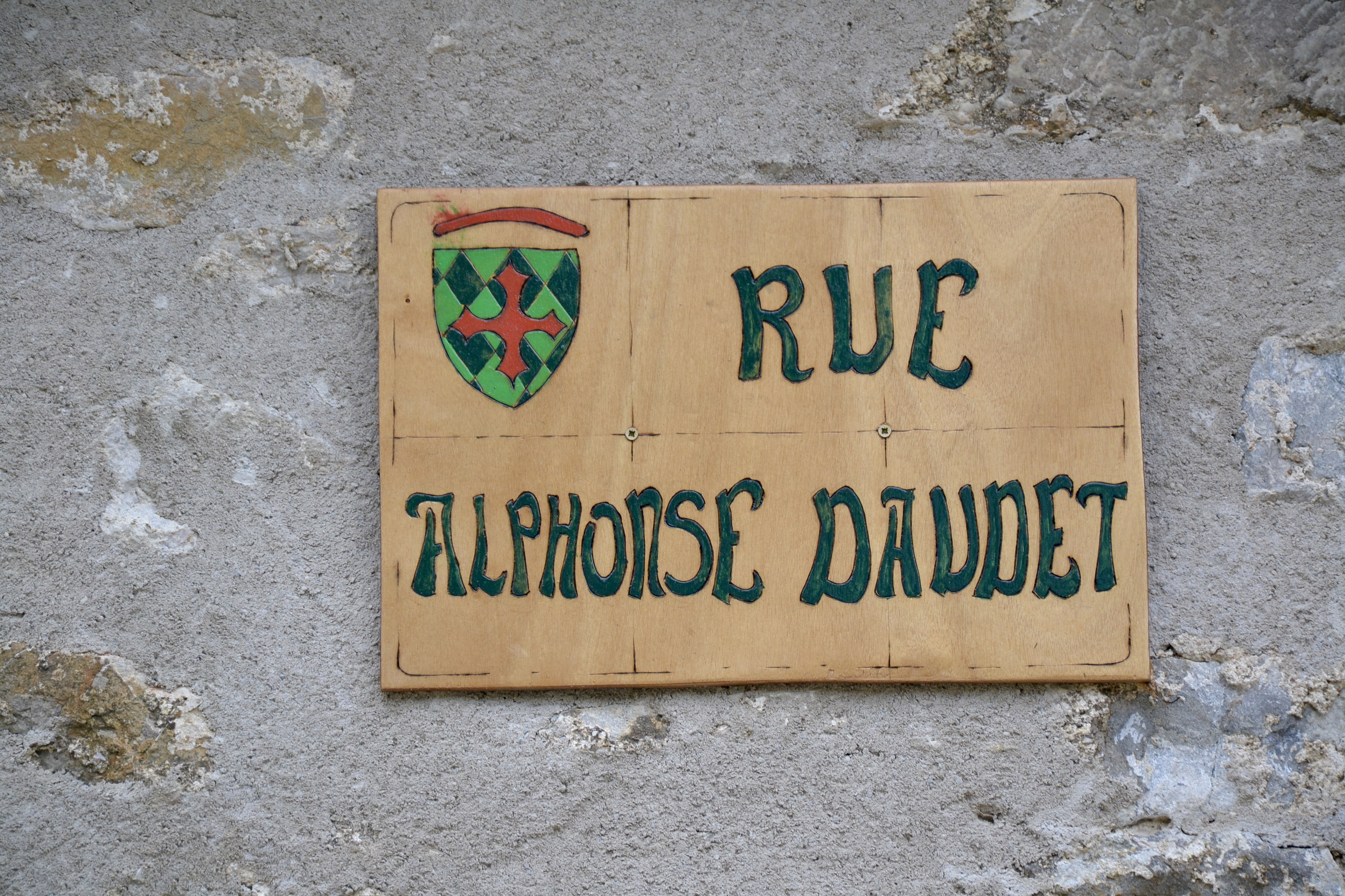 Rue Alphonse Daudet à Cucugnan (Aude, France).